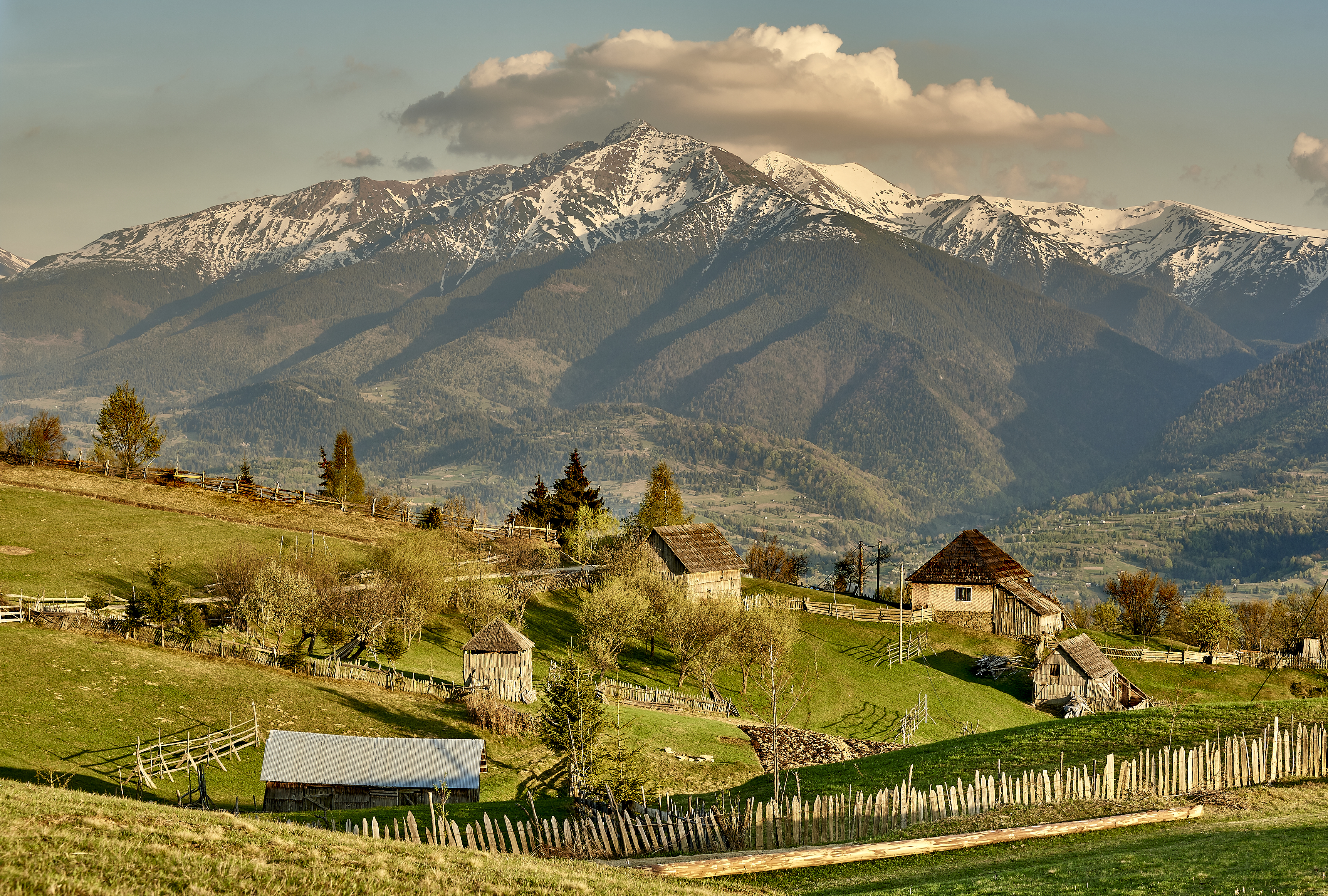 Rodnei Mountains, Maramures, Romania.